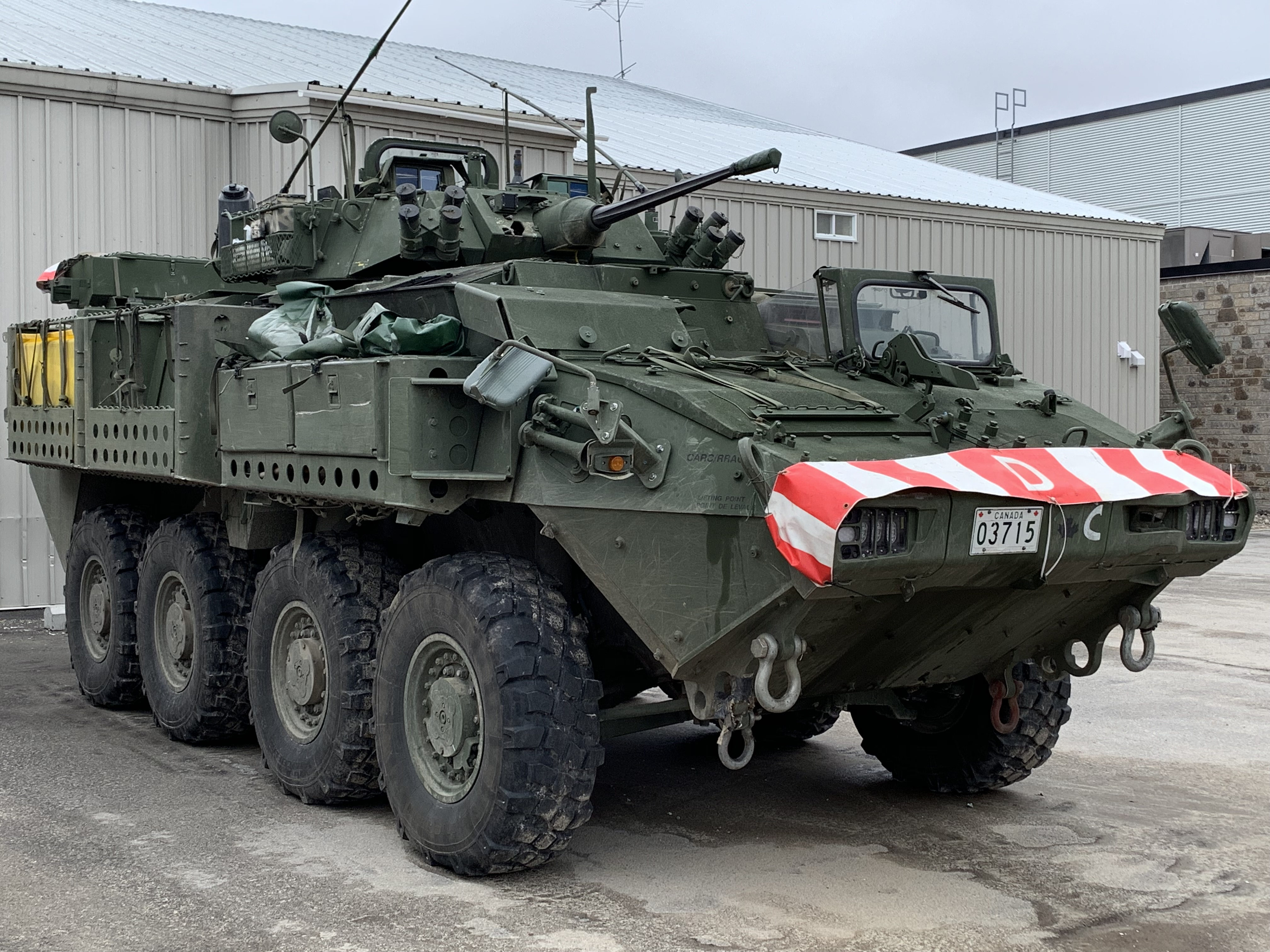 véhicule militaire à saint-andré-avellin lors des inondations de 2019